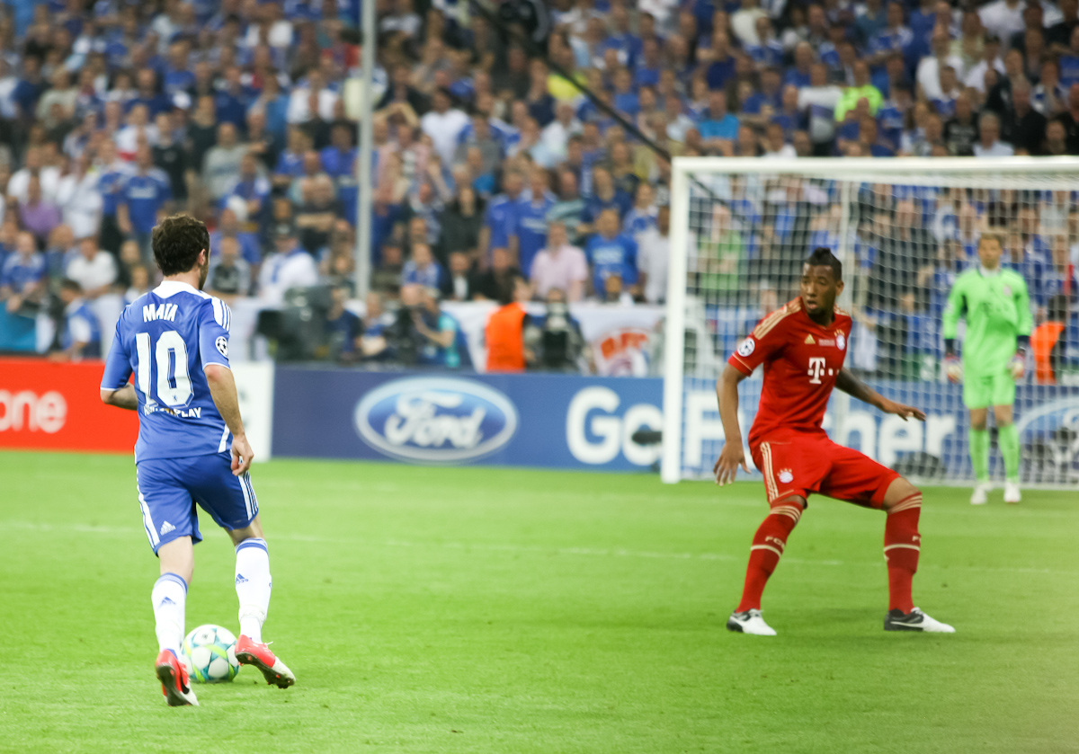 RA1_6160